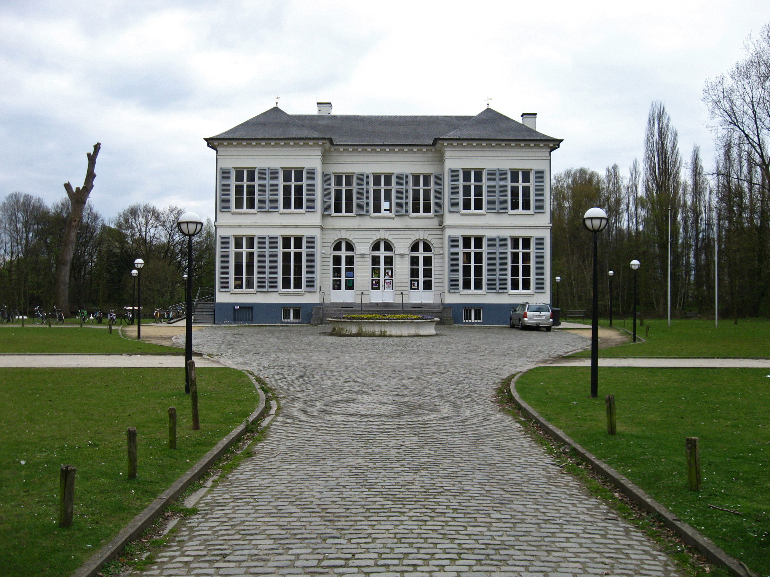 Kasteel Bouckenborgh, nu cultureel centrum in Merksem, midden in een park.